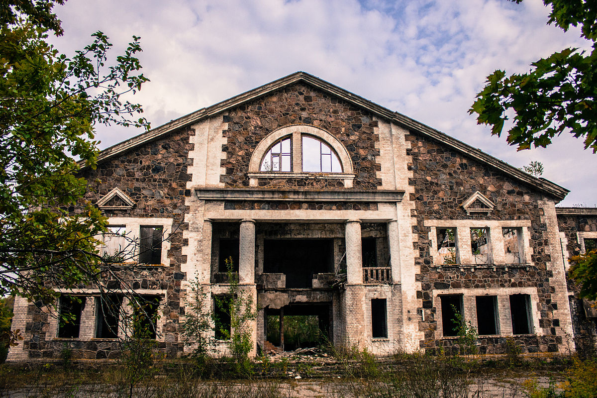 Шахта Сомпа 2018